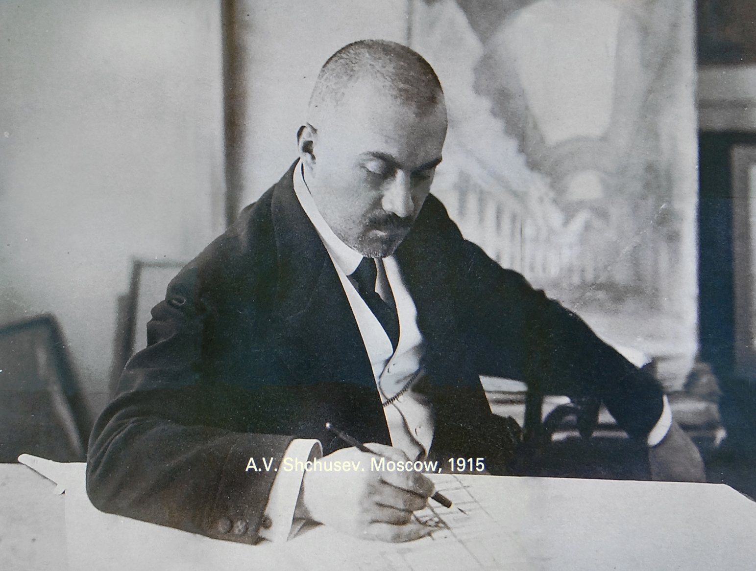 Photo d'archive de l'architecte Alexey Shchusev présentée dans l'espace "Shchusev Architects" du pavillon national de la Russie Durant sa carrière, l'architecte A. Shchusev a eu un souci permanent d'innovation sans toutefois oublier le passé ; contrairement à beaucoup de ses pairs, il estimait que les meilleures idées ne naissent que d'une longue concertation avec les commanditaires et les futurs utilisateurs (selon le texte du stand "Shchusev Architects") Le site officiel du pavillon russe de la biennale d'architecture 2014 Le pavillon de Russie a été construit en 1914 par le célèbre architecte russe Alekey Shchusev (1873-1949) dans les jardins (giardini) de Venise pour permettre à son pays de participer à la Biennale d'art car à l'époque c'est le modèle des expositions universelles avec leurs pavillons nationaux qui prévaut. C’est l’un des quelques pavillons nationaux construits avant la Première Guerre mondiale. Il a été construit dans un style néo-russe baroque. Il a été restauré en 2010 par l'architecte Clemente di Thiene avec le soutien d'Alfa-Bank. La construction a commencé quand le tsar gouvernait encore la Russie, et s’est terminée plus de trente ans plus tard, lorsque le pays était déjà l’Union Soviétique. Shchusev né en 1873 à Kishinev, Moldova, est un architecte reconnu, on lui doit des stations de métro à Moscou, le mausolée de Lénine et de nombreuses églises russe en Russie et à l’étranger. Article de Wikipedia L'entrée du pavillon russe en 2013 et en 2010 (photos dalbera)